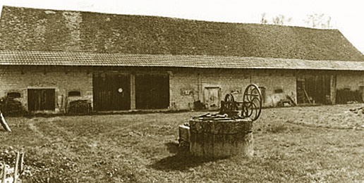 Ferme Bressane de La Picardière/ Bresse station the "Picardière"